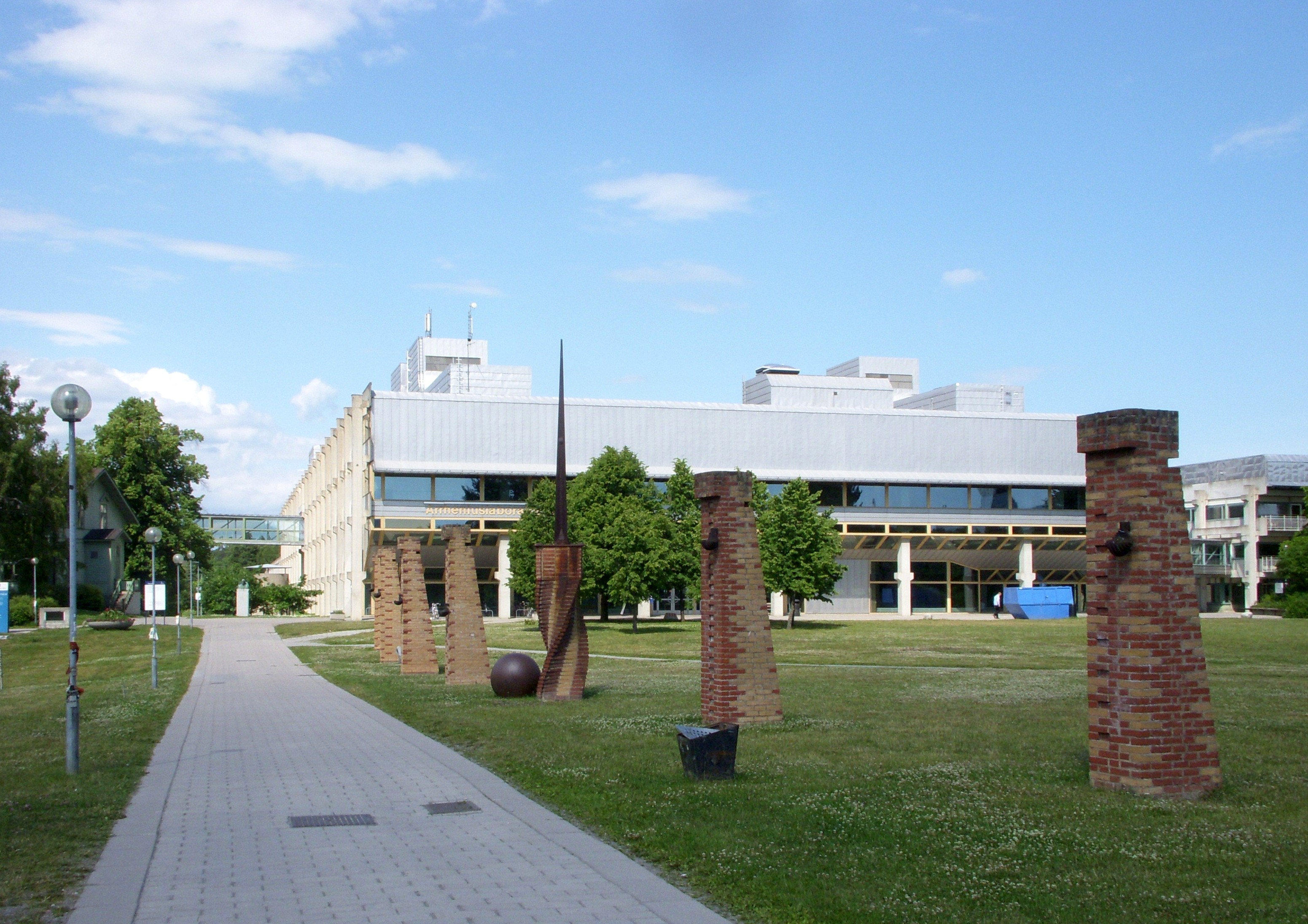 Arrheniuslaboratoriet